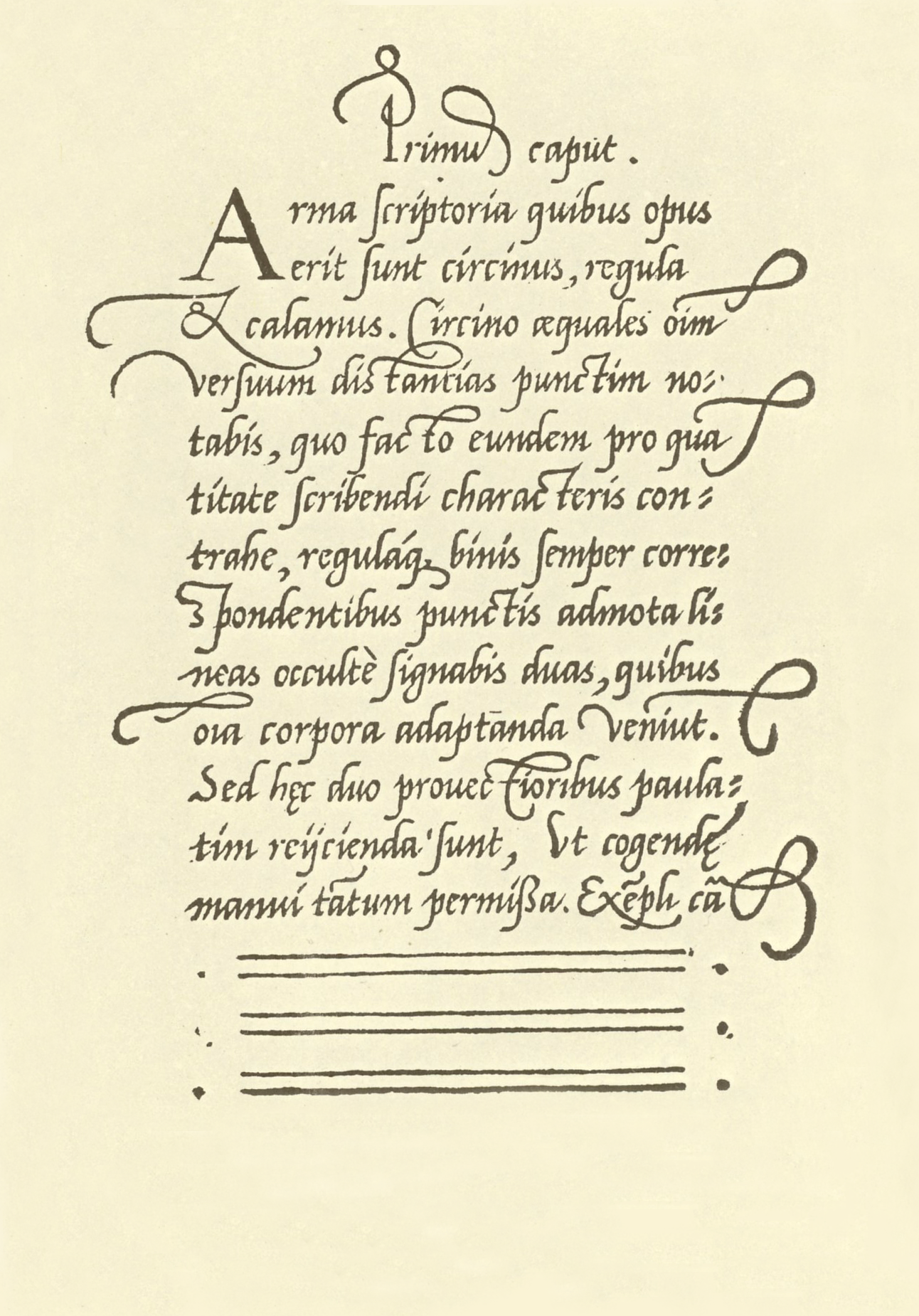 Aus dem Schreibmeisterbuch des Gerhard Mercator: Litterarum latinarum, quas Italicas, cursoriasque vocant, scribendarum Ratio. Seite 4